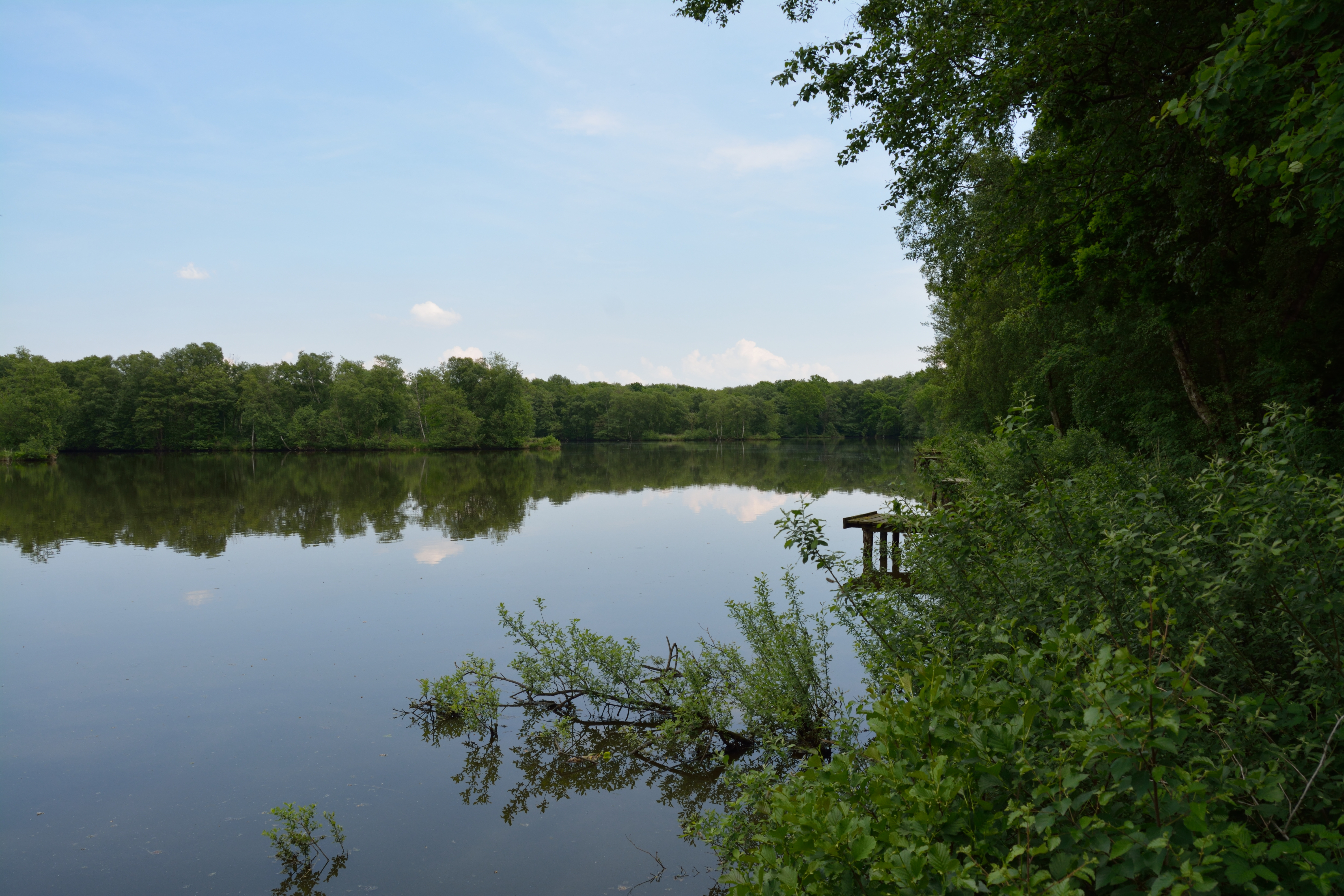 Impressionen aus dem Landschaftsschutzgebiet "Geesthang bei Dägeling mit Bockwischer Moor"